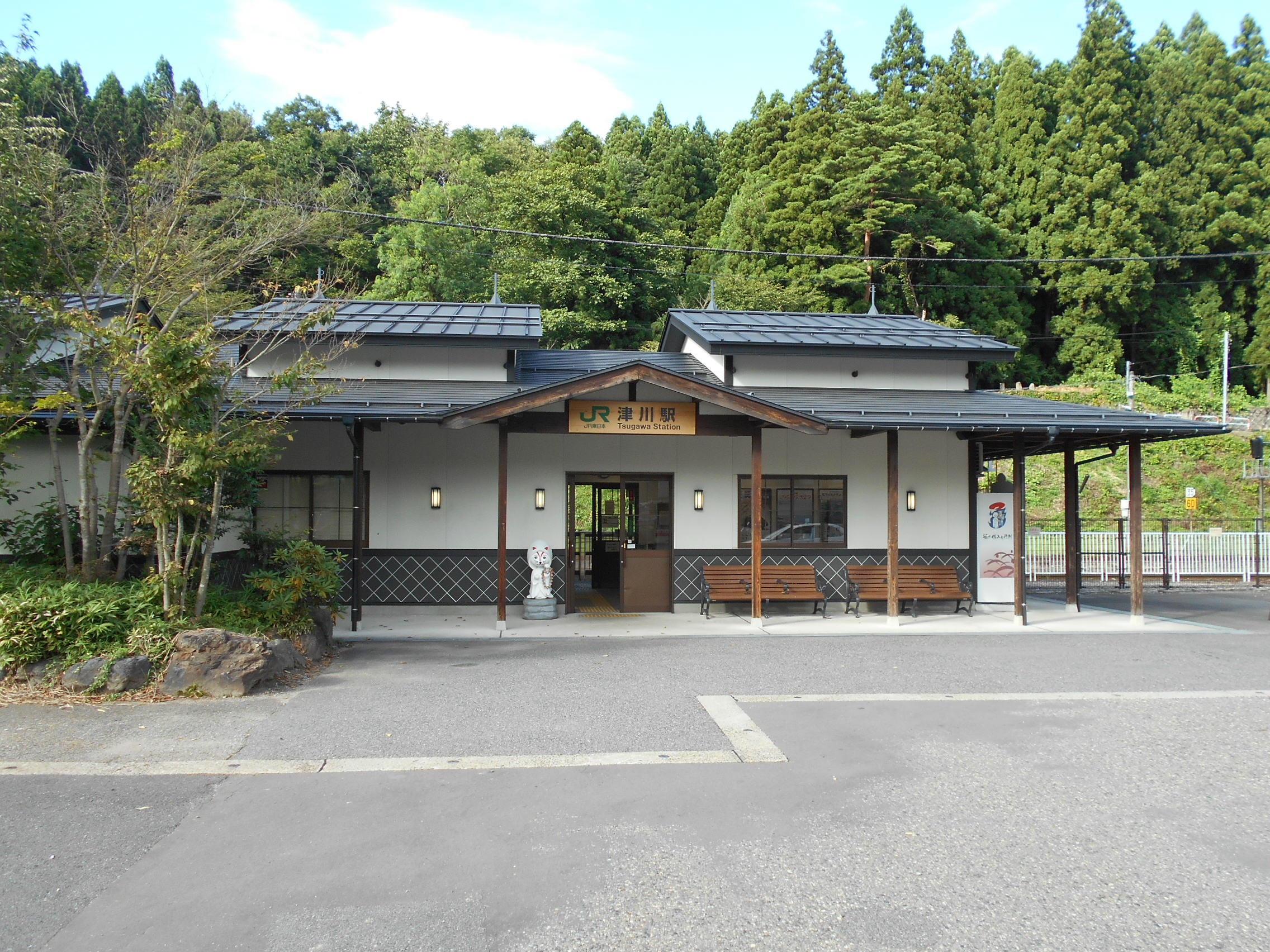 JR東日本磐越西線津川駅